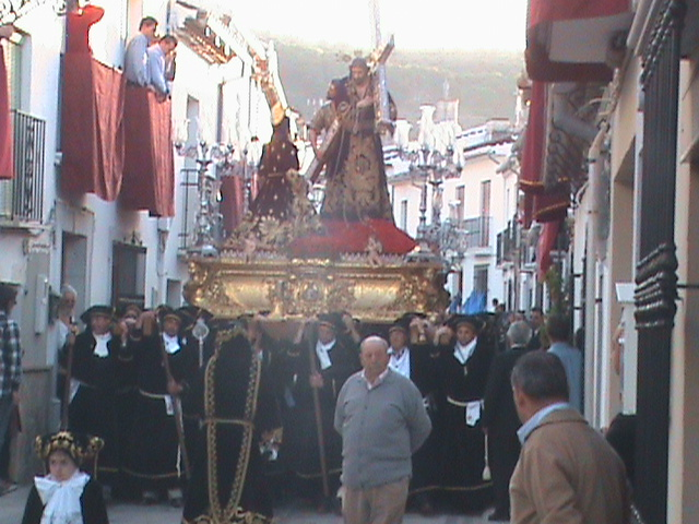 Jesús Nazareno llevando la Cruz junto con Simón Cirineo y la Verónica